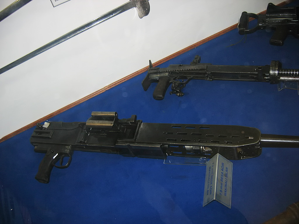 Havacılık Müzesi Yeşilköy, İstanbul